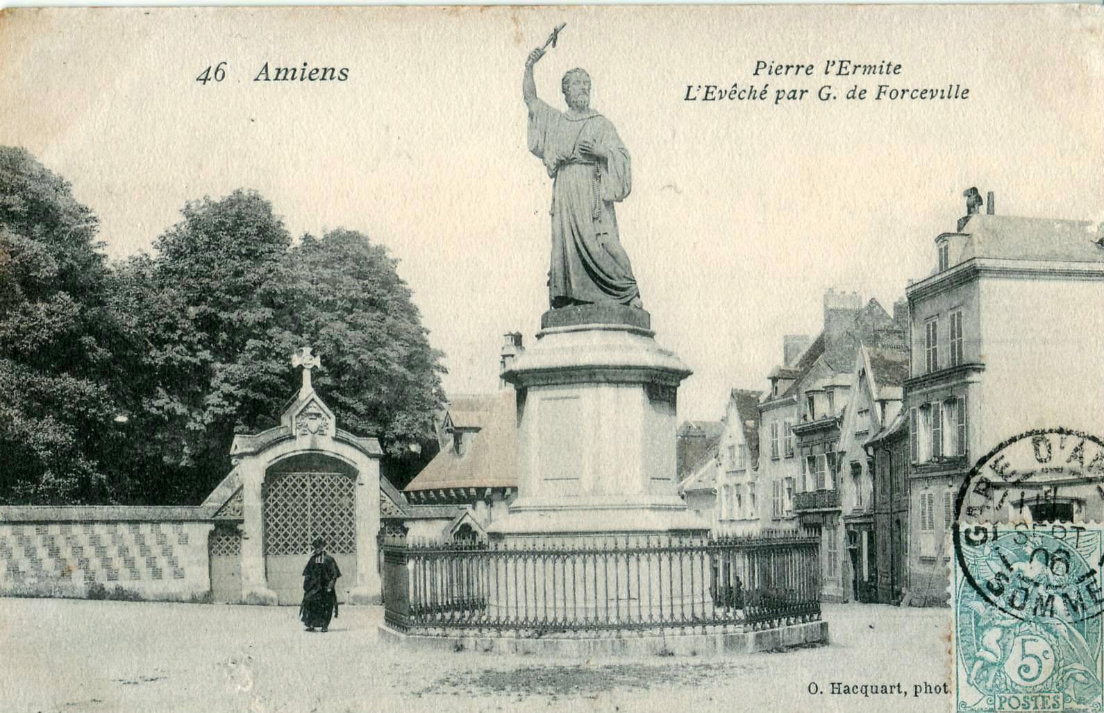 Carte postale ancienne éditée par O. Hacquart, n°46 :AMIENS - Piuerre l'Ermite - L'évêché, par G. de Forceville.(Statue de Saint Pierre l'Ermite (Saint Pierre d'Amiens) au chevet de la cathédrale d'Amiens, France. Oeuvre de Gédéon de Forceville, inaugurée en 1854)